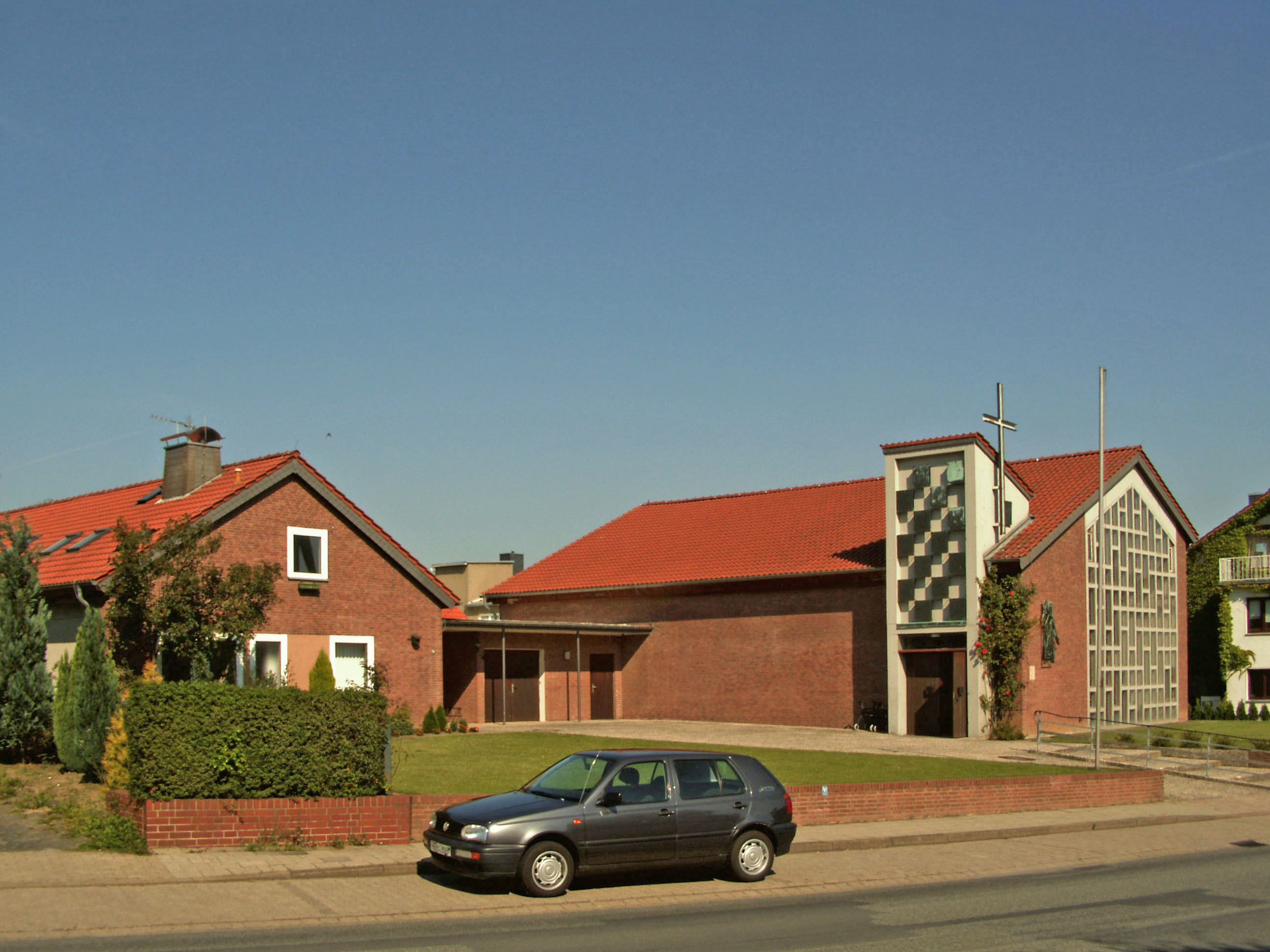 Katholische Kirche St. Norbert und Pfarrhaus in Grasleben